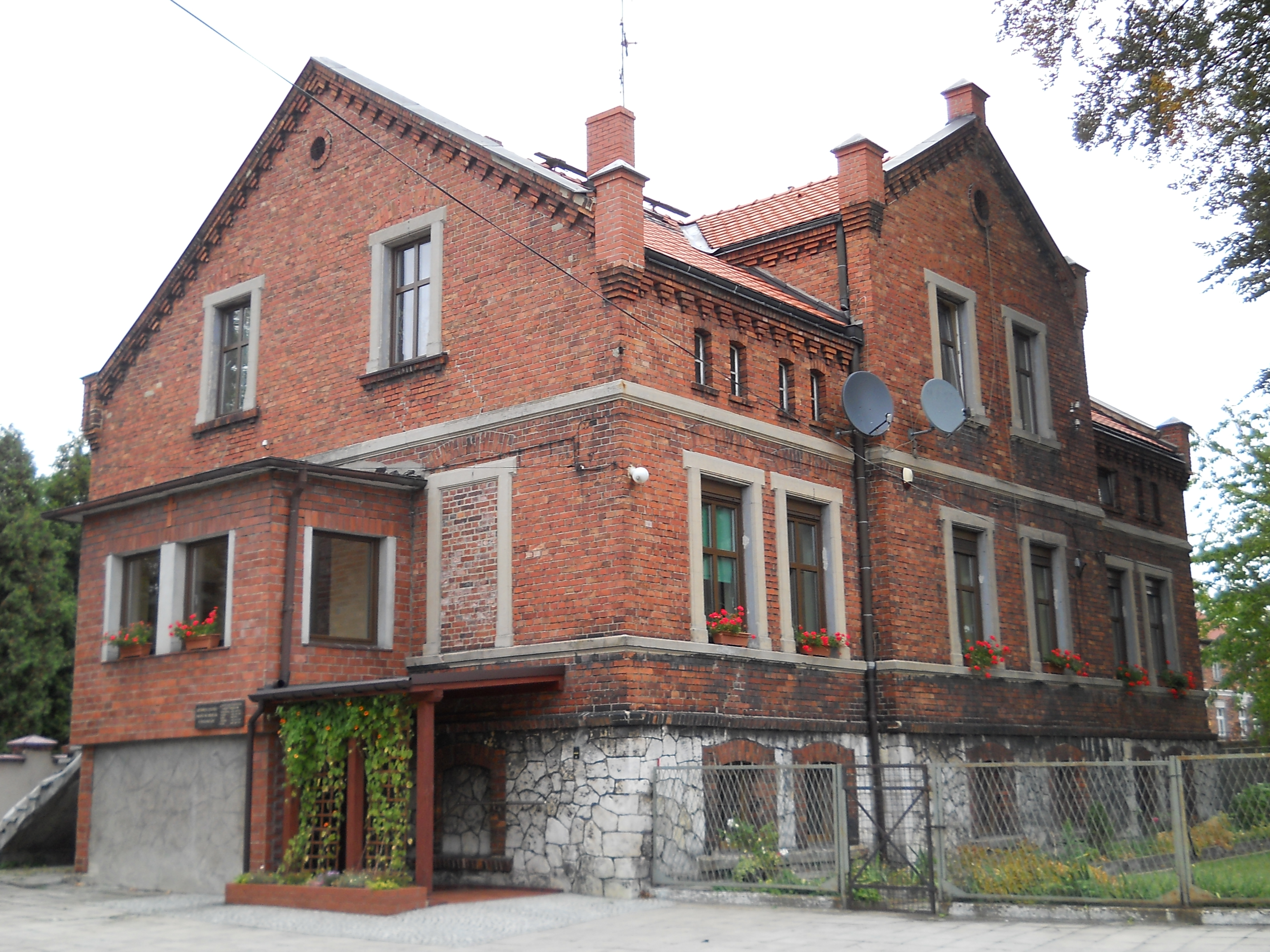 Pyskowice, ul. Poniatowskiego 10 - kościół parafialny pw. św. Mikołaja, plebania, widok od strony tylnej (zabytek nr A/289/60 z 7.03.1960)